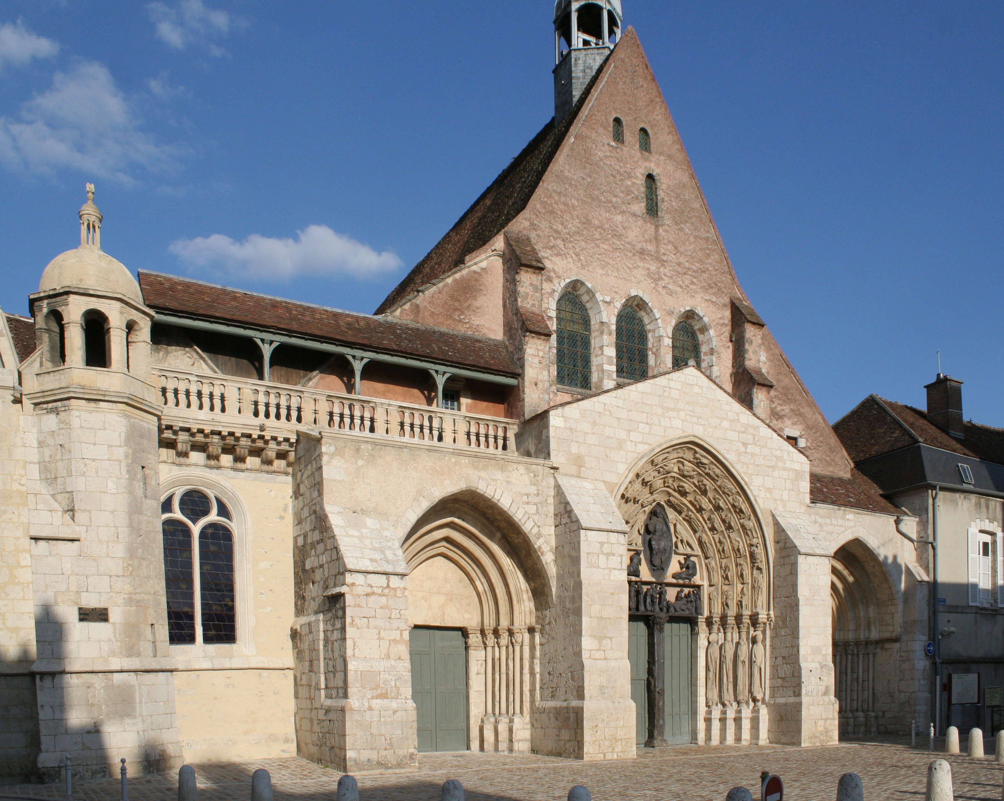 Provins (Seine-et-Marne), église Saint-Ayoul, façade occidentale.